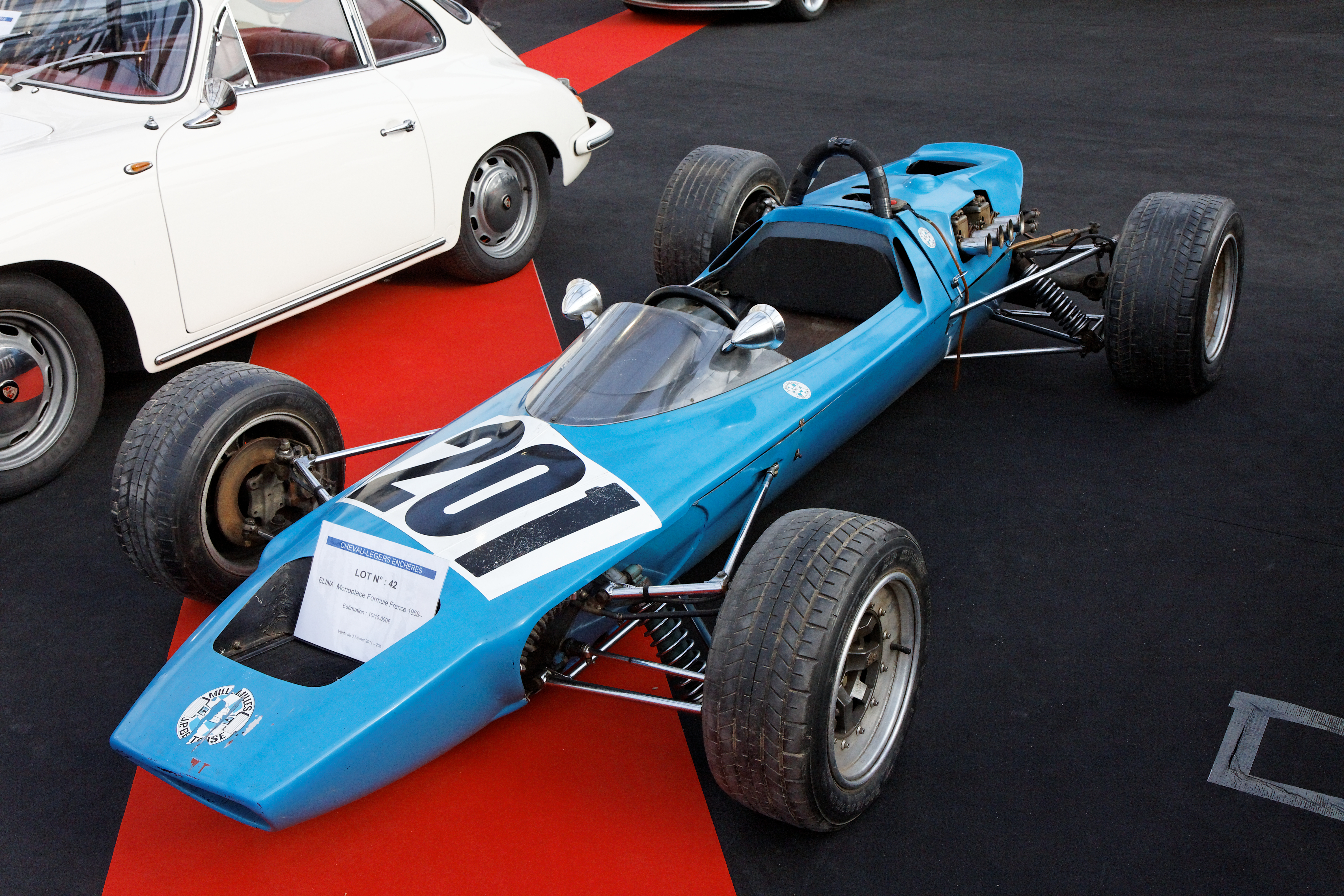 Elina racing car - Festival Automobile International 2011 - Vente aux enchères